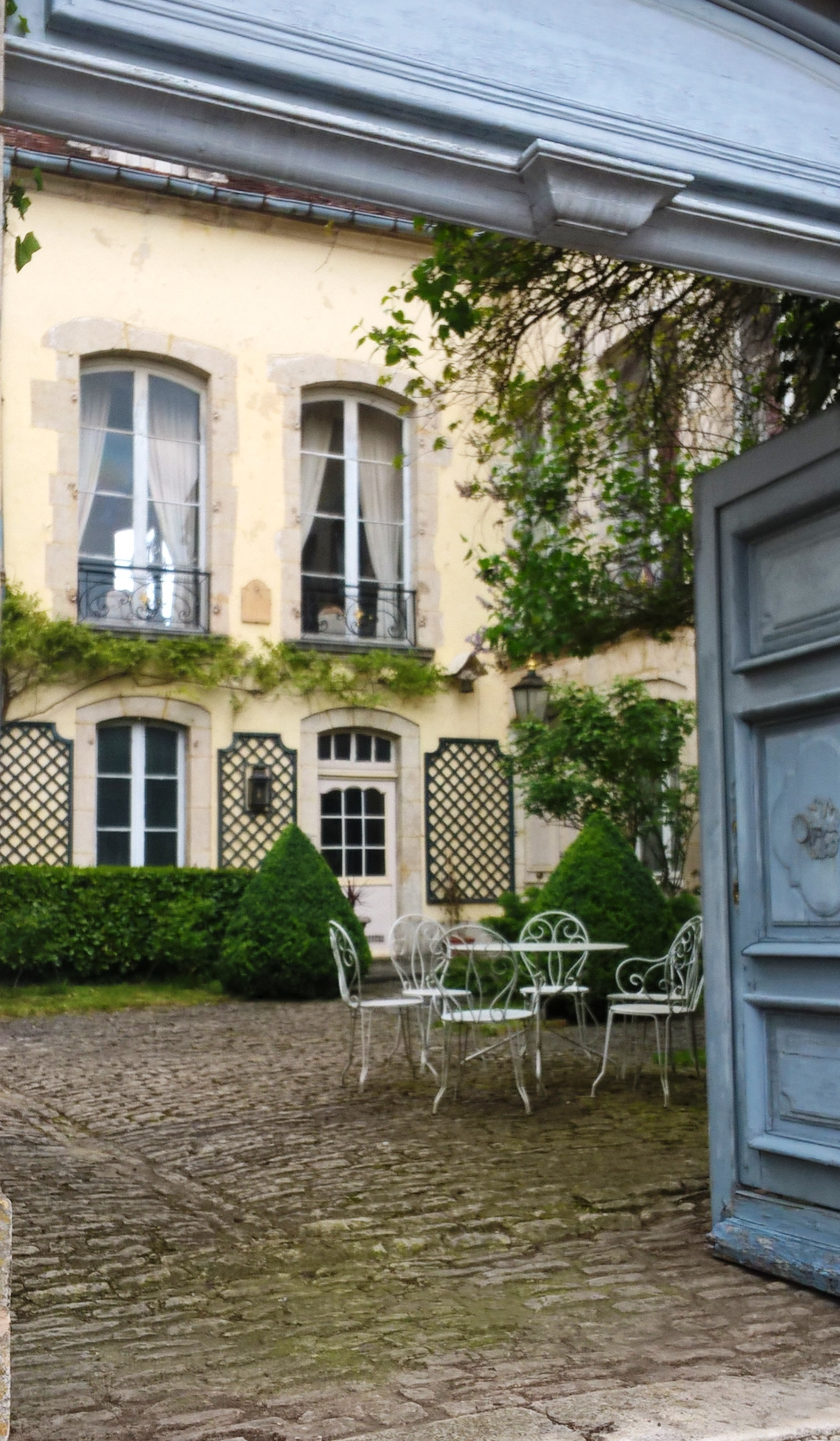 Cour intérieure de l'Hôtel du Congrès